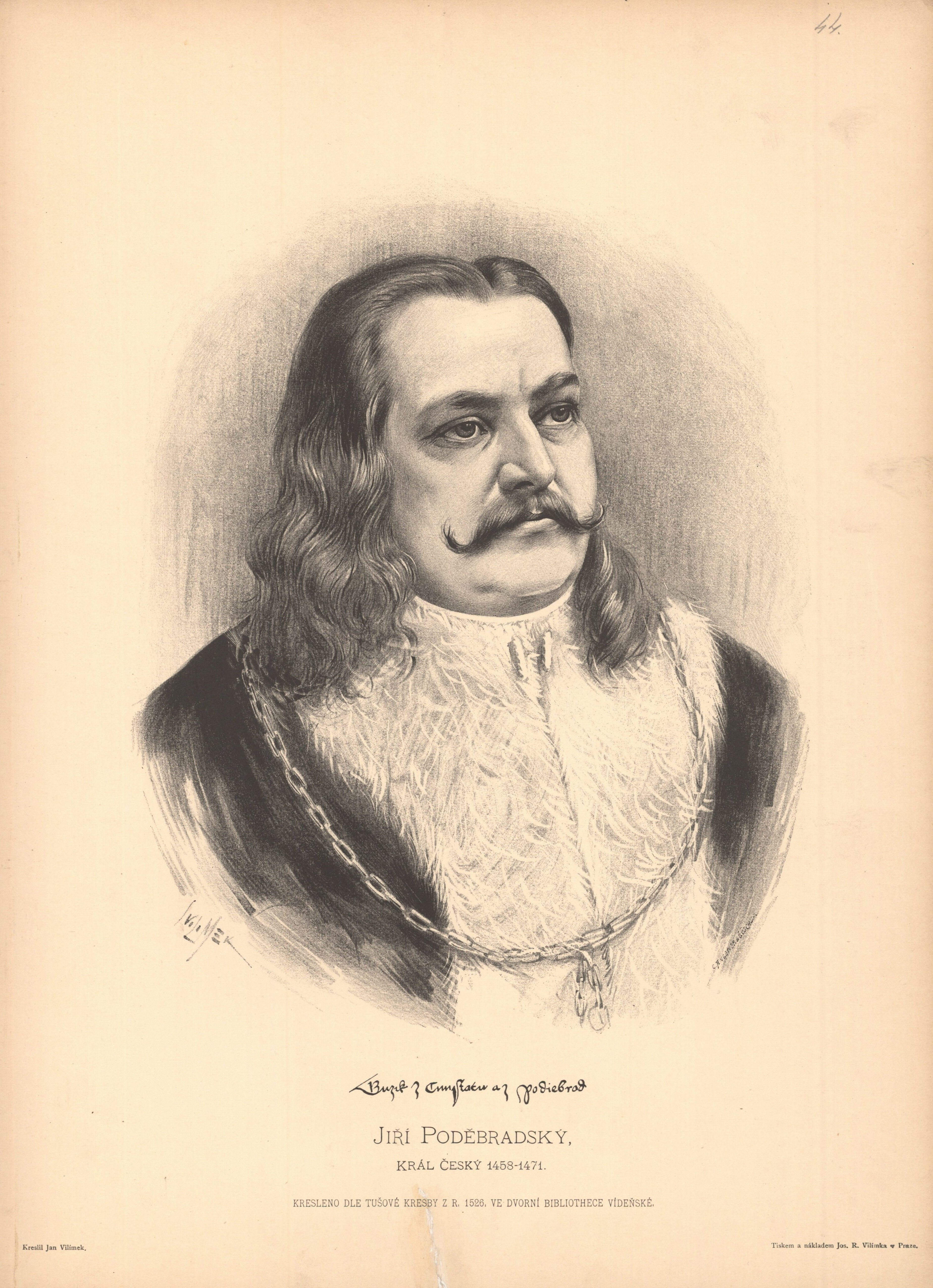 Portréty českých osobností od Jana Vilímka